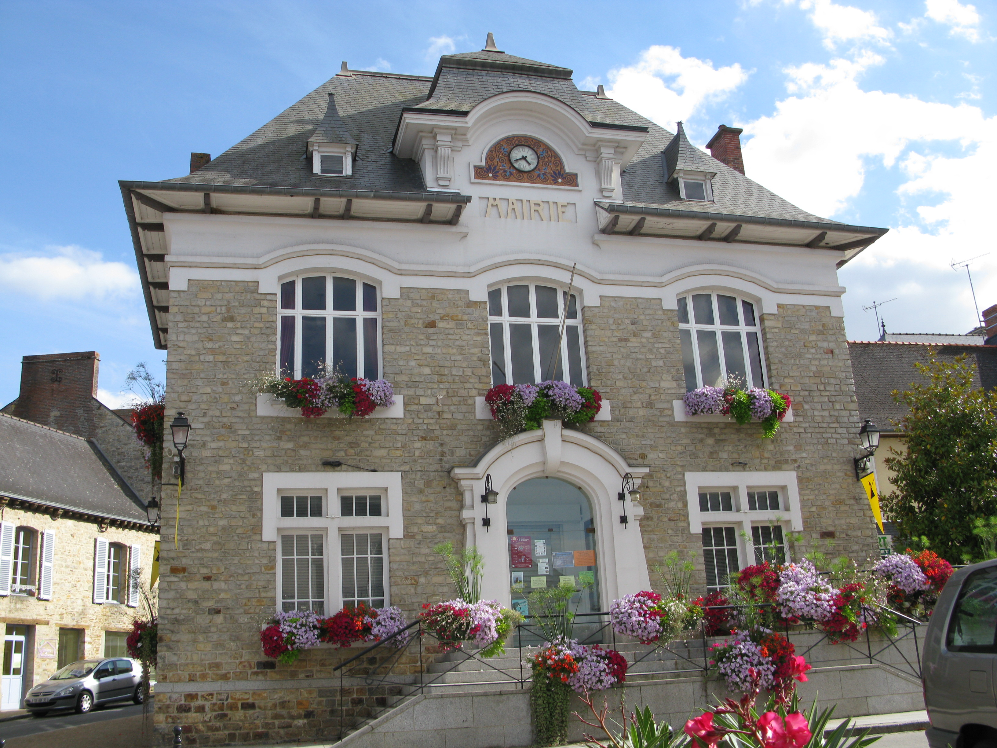 Mairie de Martigné-Ferchaud